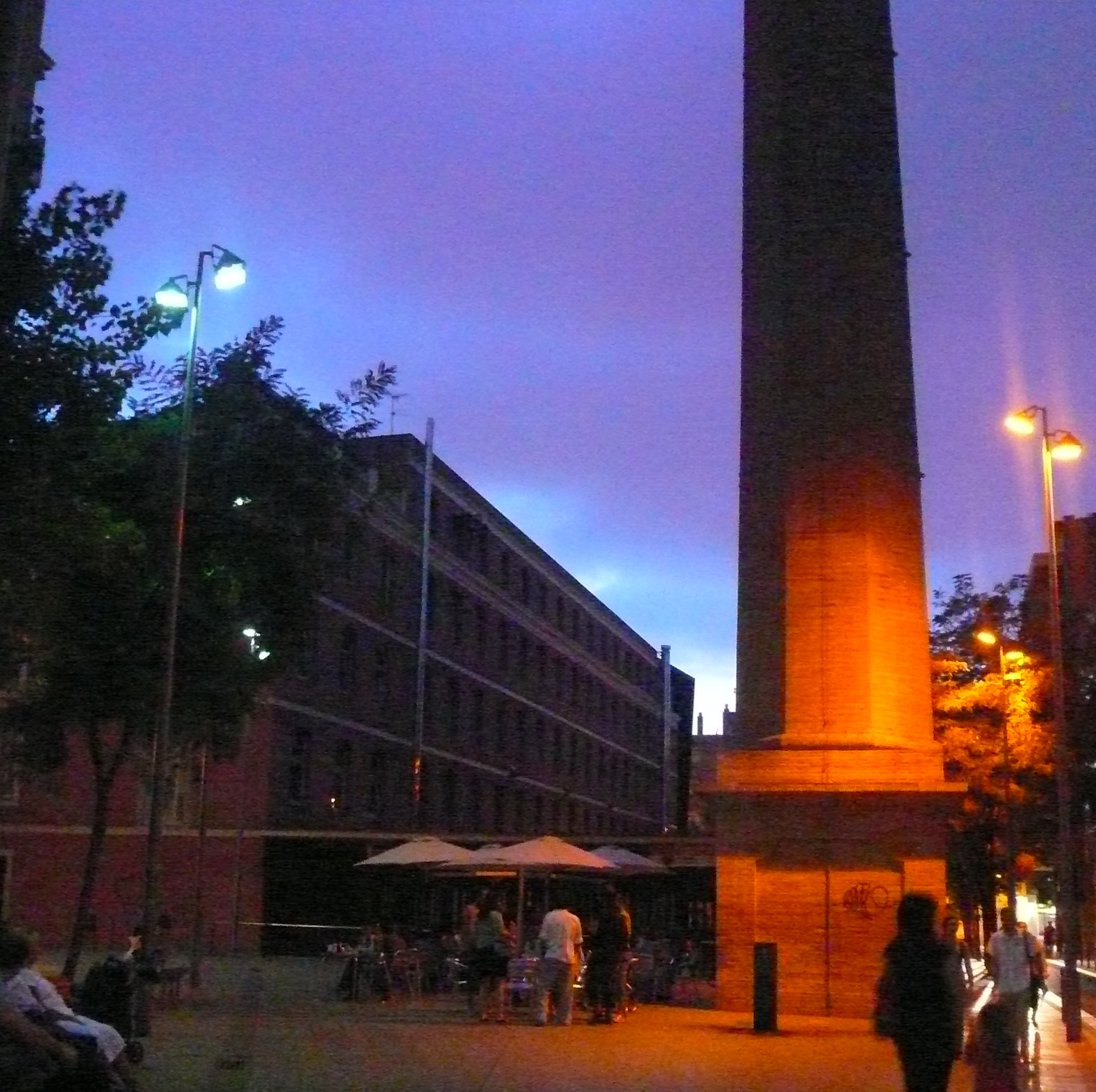 Vapor Vell de Sants (Barcelona)